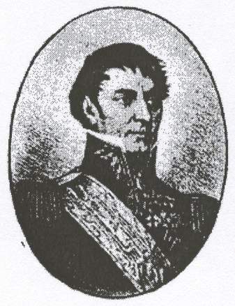 Louis Marie De Camps